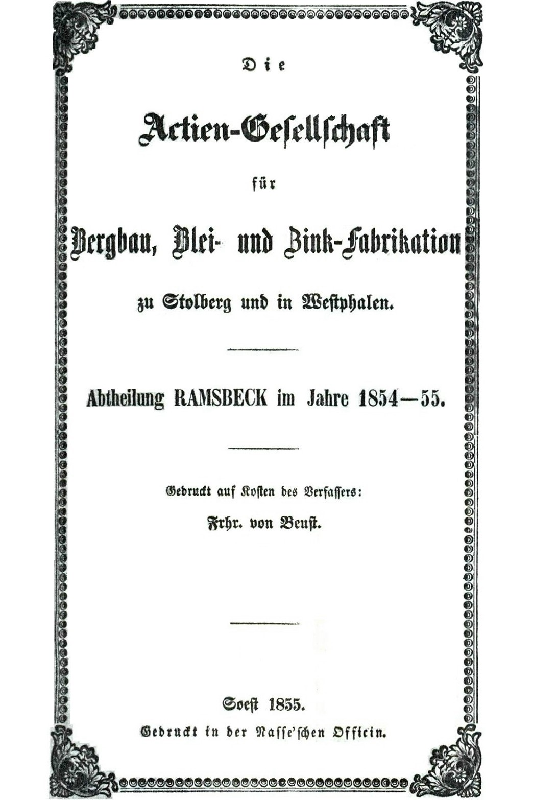 Titelblatt des Buches: Frhr. von Beust, Die Actien-Gesellschaft für Bergbau, Blei- und Zink-Fabrikation zu Stolberg und in Westfalen. Abtheilung Ramsbeck im Jahre 1854-55. Soest 1855